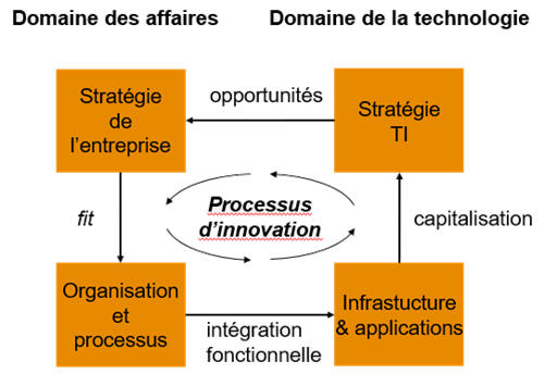 Une adaptation simplifiée et traduite du modèle présenté dans Henderson, J. C. and N. Venkatraman (1990). Strategic alignment: A model for organisational transformation through information technology. Cambridge, MA, MIT Sloan School of Management.